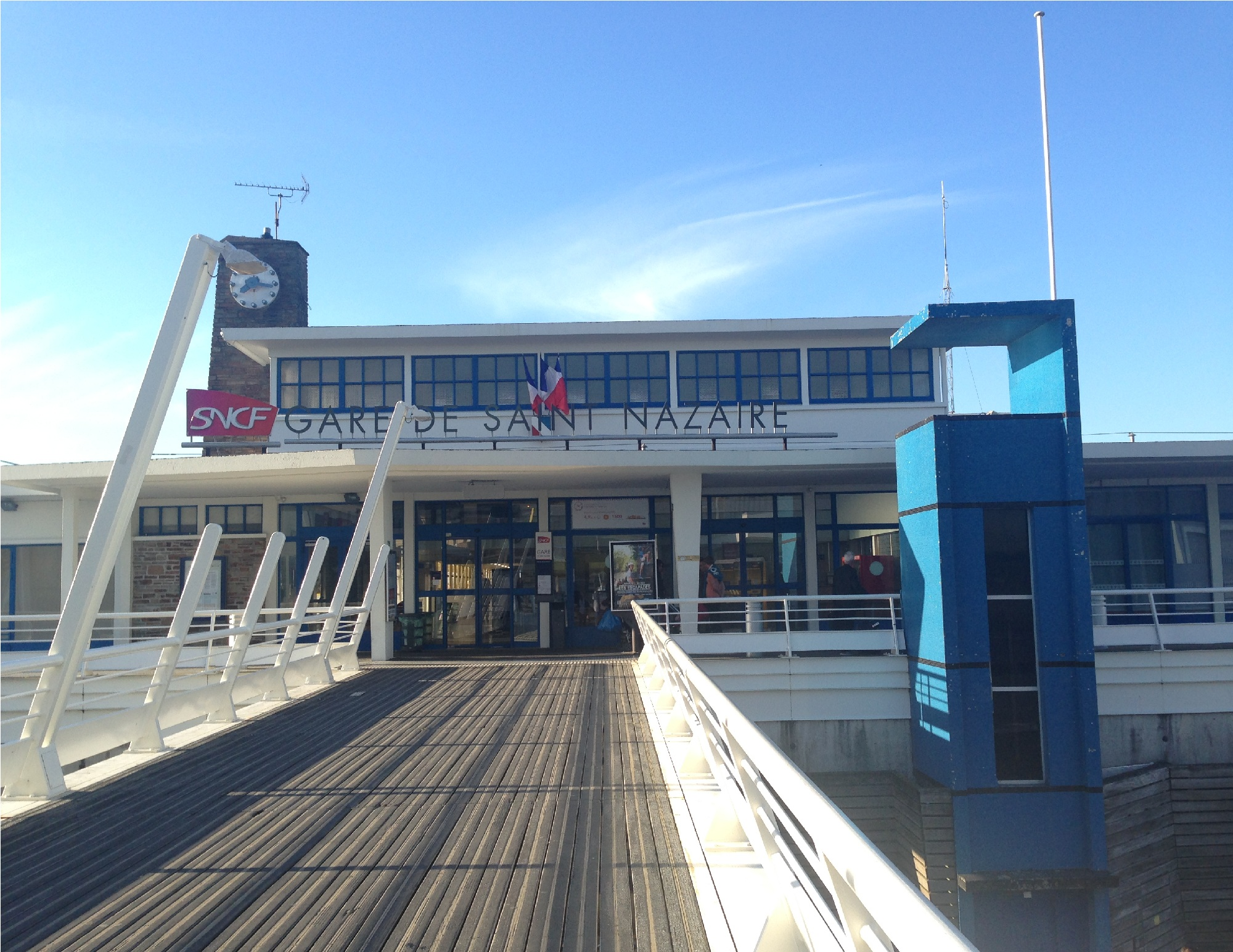 Gare de Saint-Nazaire-2015